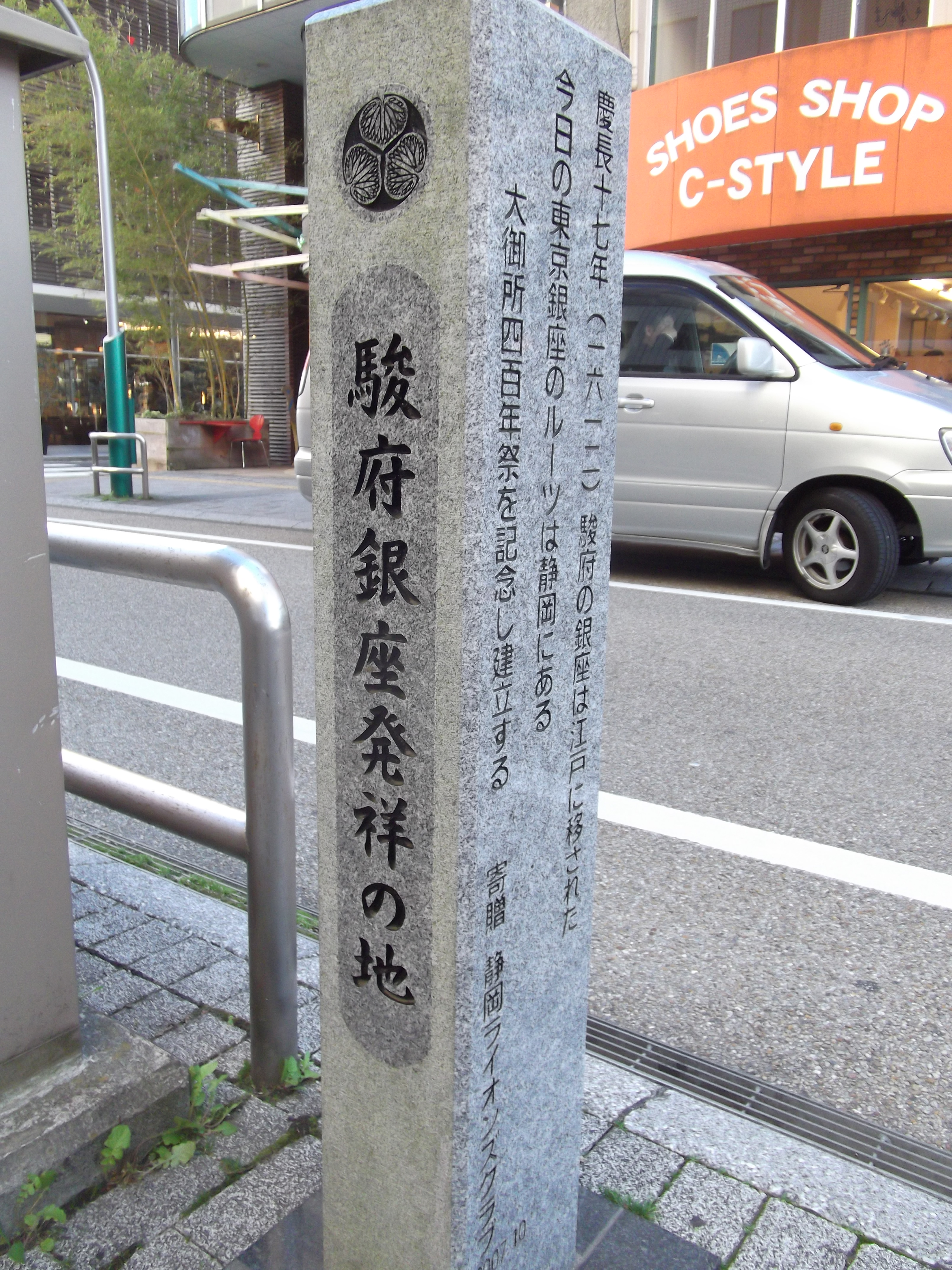 駿府銀座発祥の地の碑。静岡県静岡市葵区。